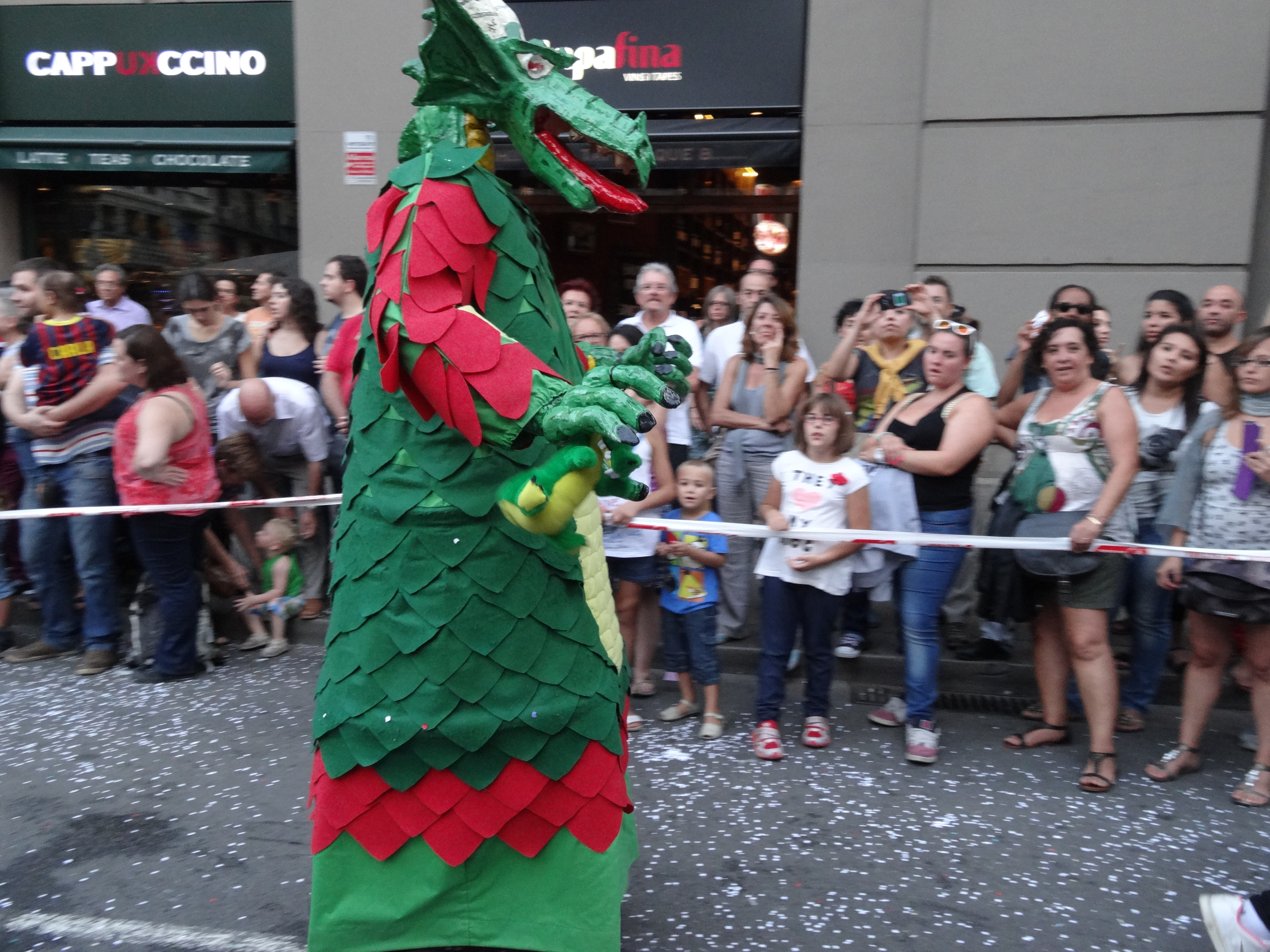 Cercavila de la Mercè 2013 a Barcelona. Gegantet Campisdrak de la Marina